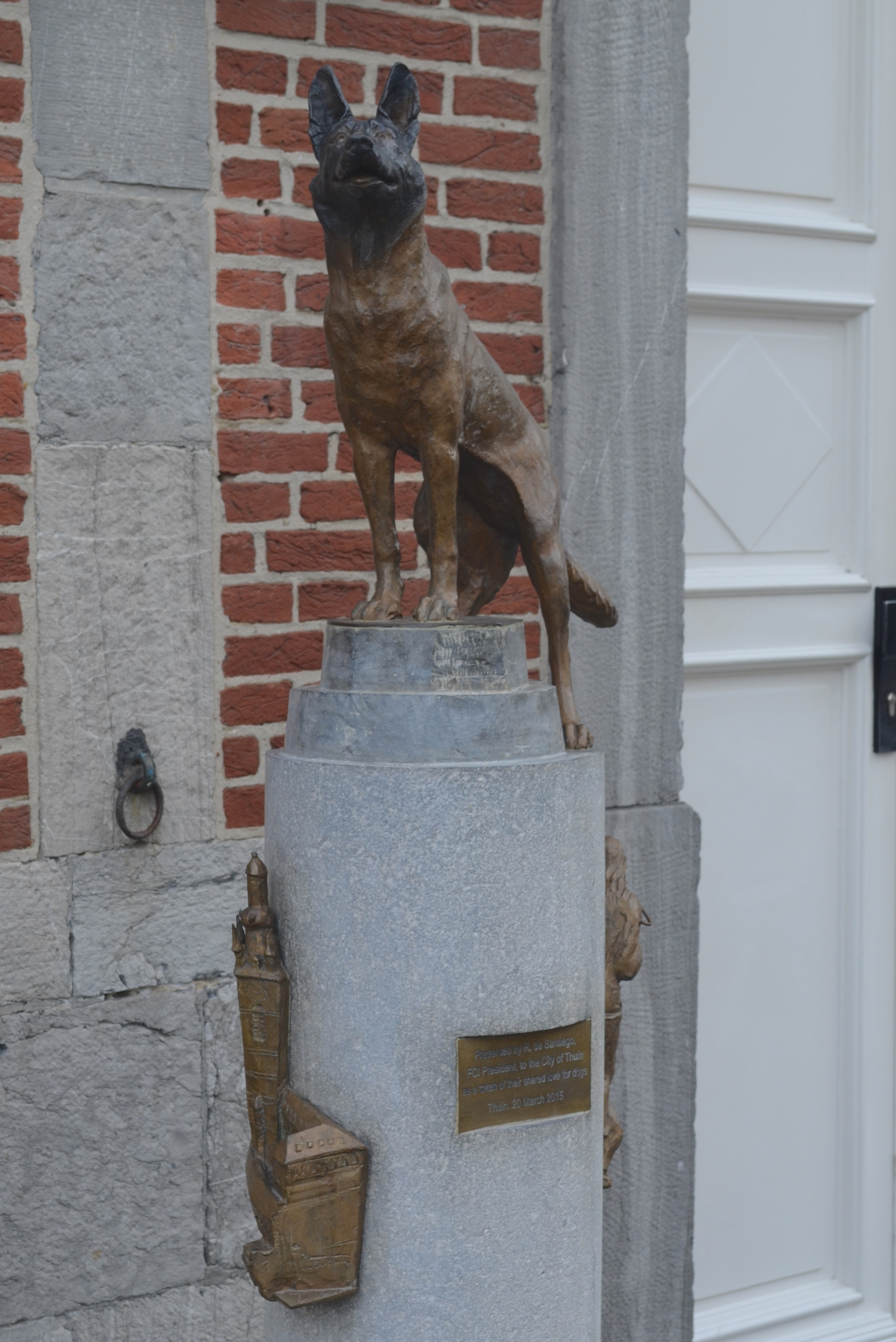 Thuin (Belgique) - monument devant la maison de la Fédération cynologique internationale.